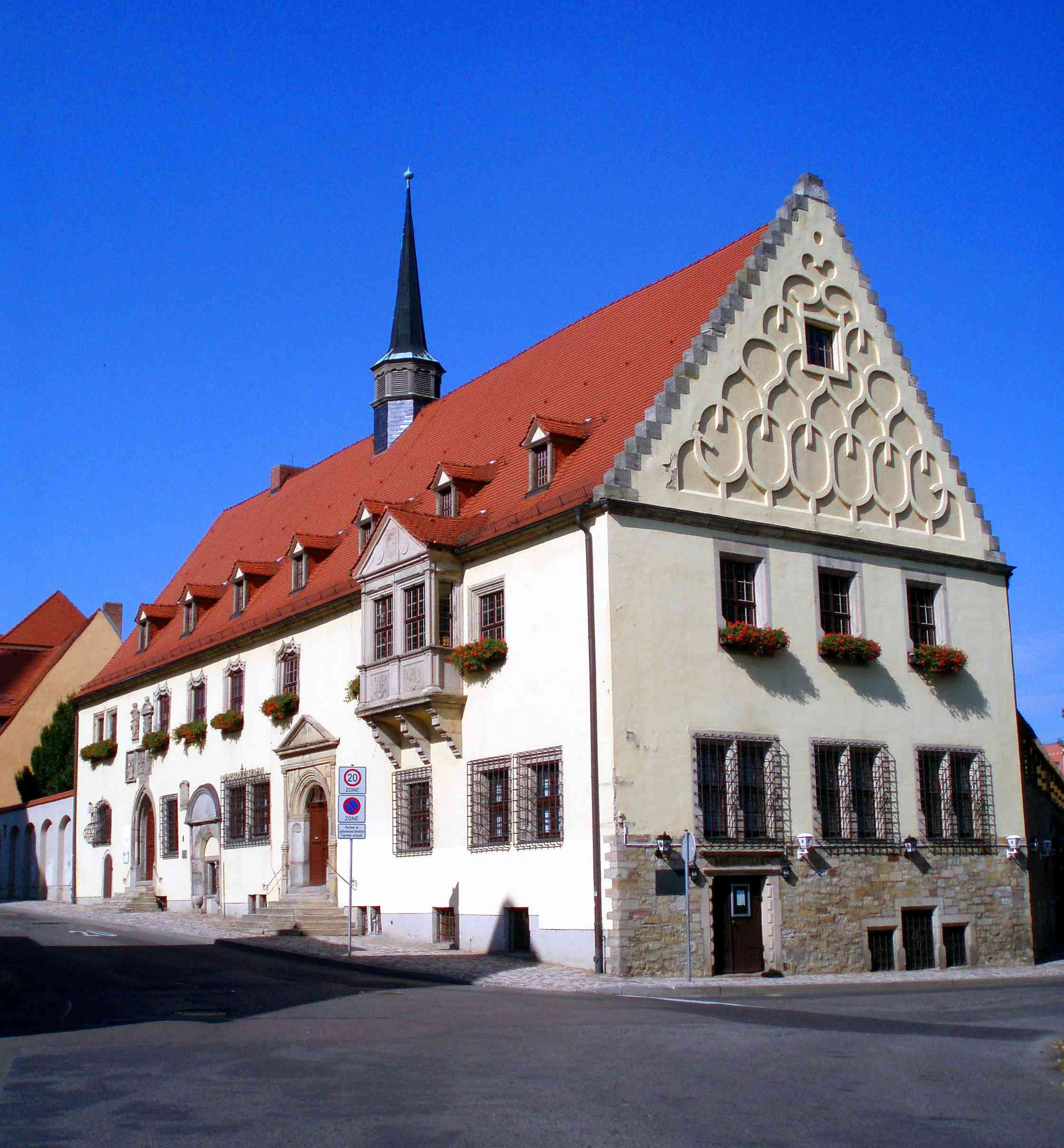 Ales Rathaus in Merseburg